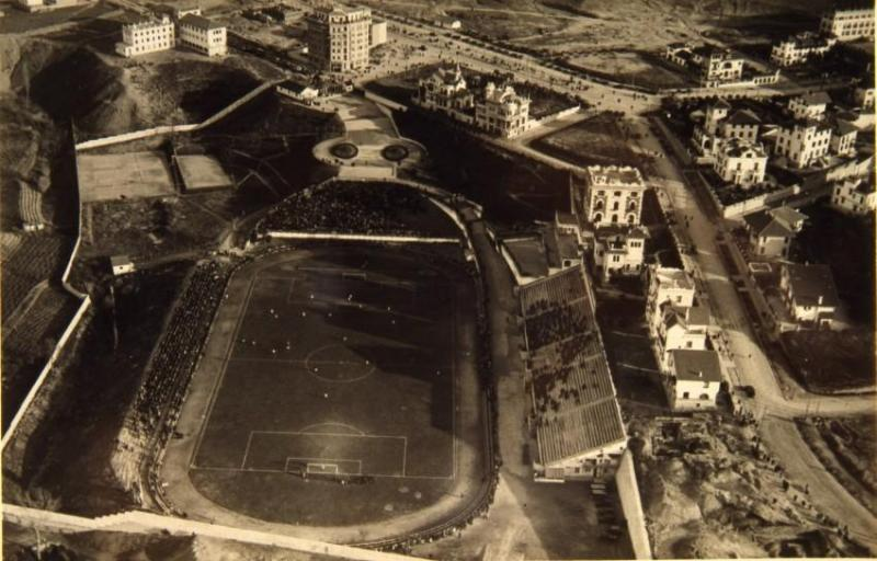 Fotografía panorámica del antiguo Stadium Metropolitano del Atlético de Madrid y parte de la Ciudad Universitaria de Madrid, tomada en 1927 (s.e.u.o., dominio público por caducidad derechos de autor).